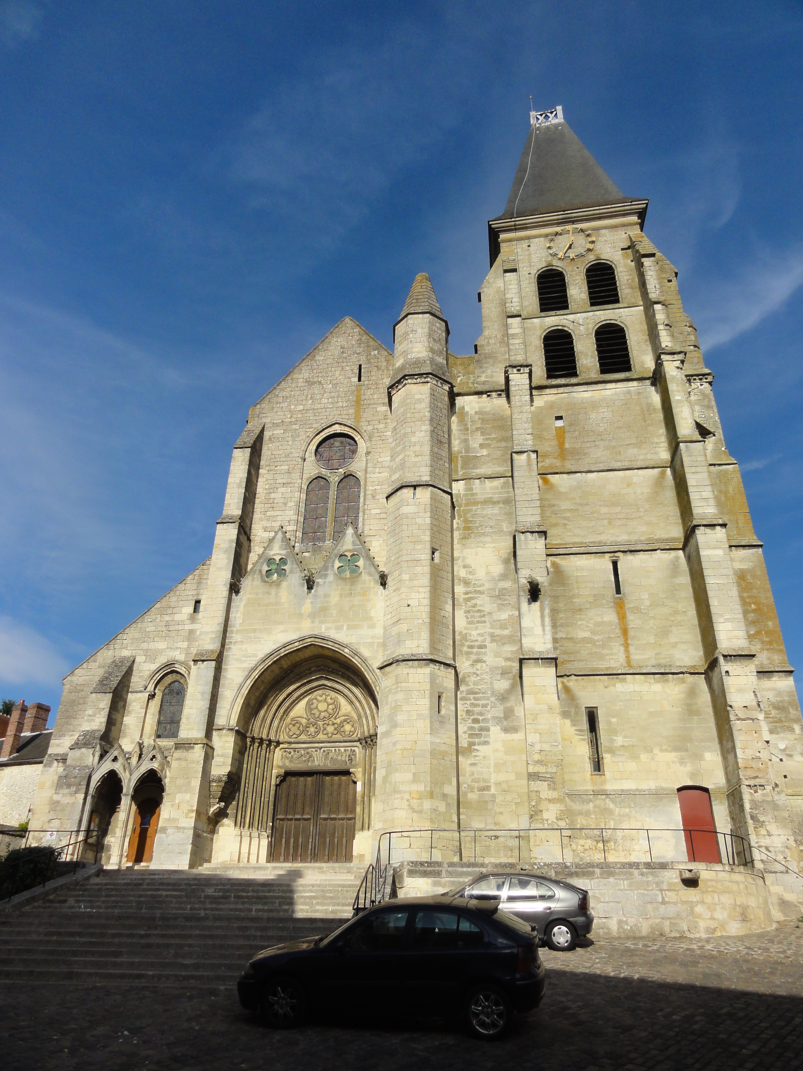 Façade occidentale.